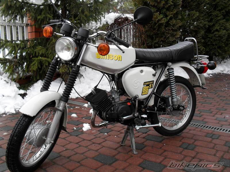 Simson S51 C w stanie idealnym